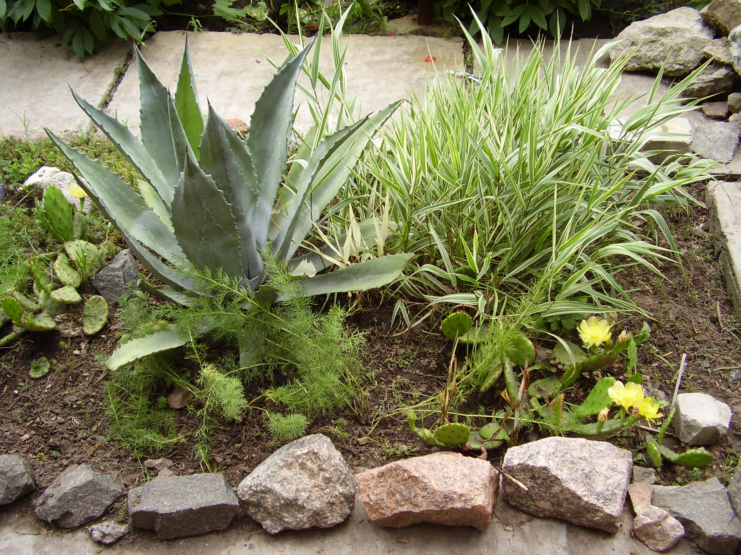 Opuntia&Agave: Сукуленти в Україні